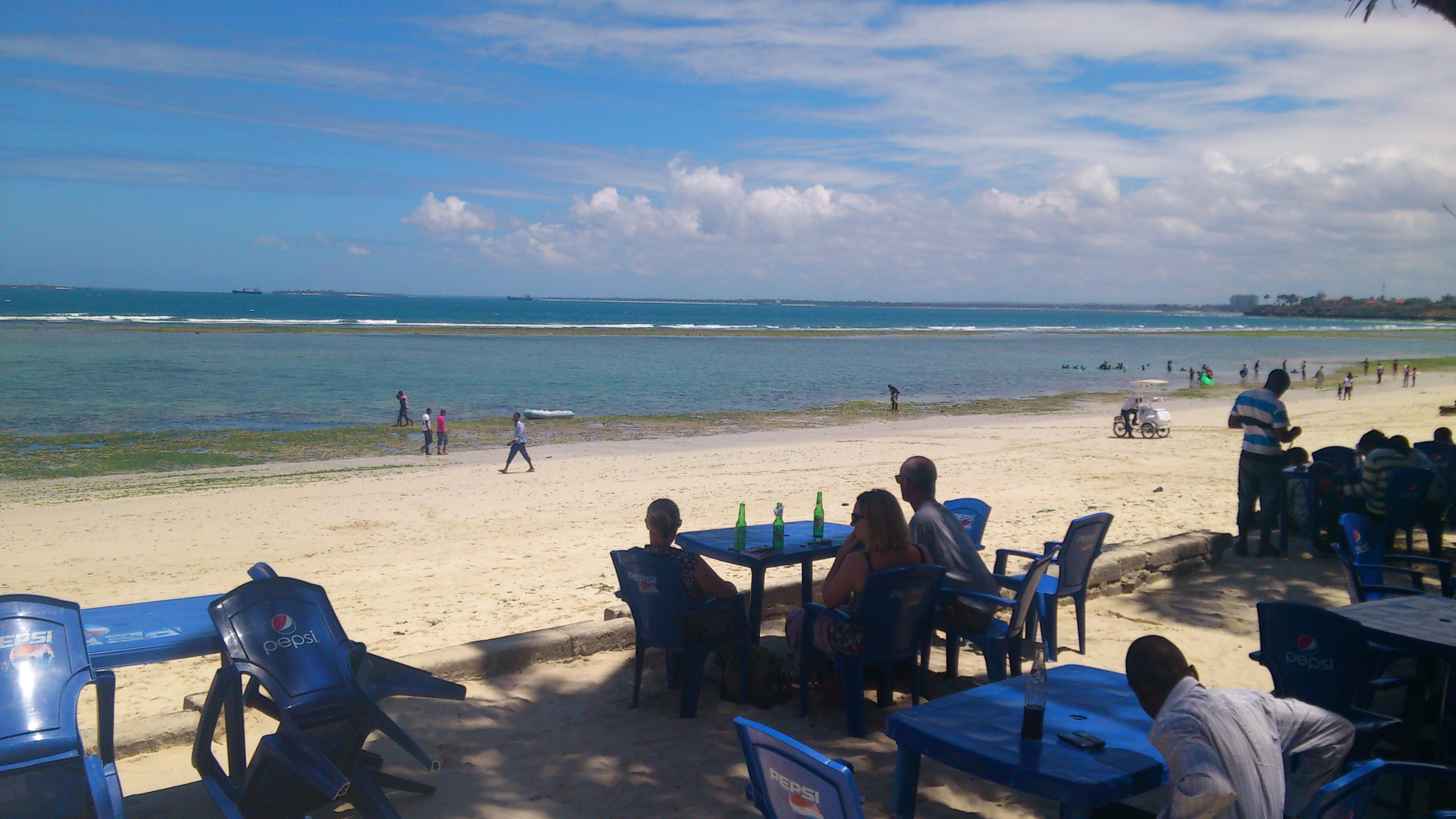 Dar es Salaam, Tanzania